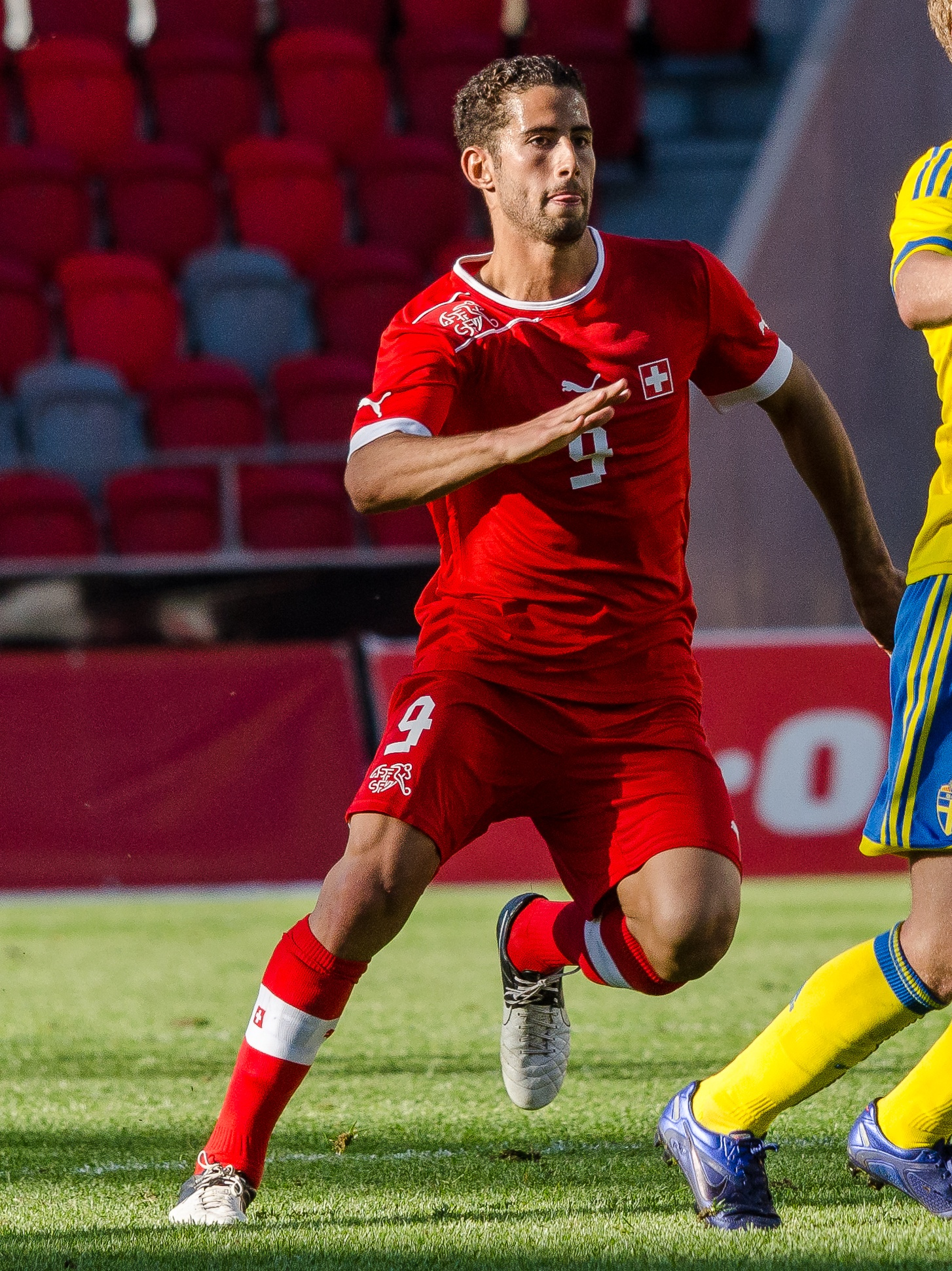 Swiss footballer Nassim Ben Khalifa in the Swiss Under-21 national team's 3-2 defeat to Sweden at Myresjöhus Arena in Växjö, June 6 2013.